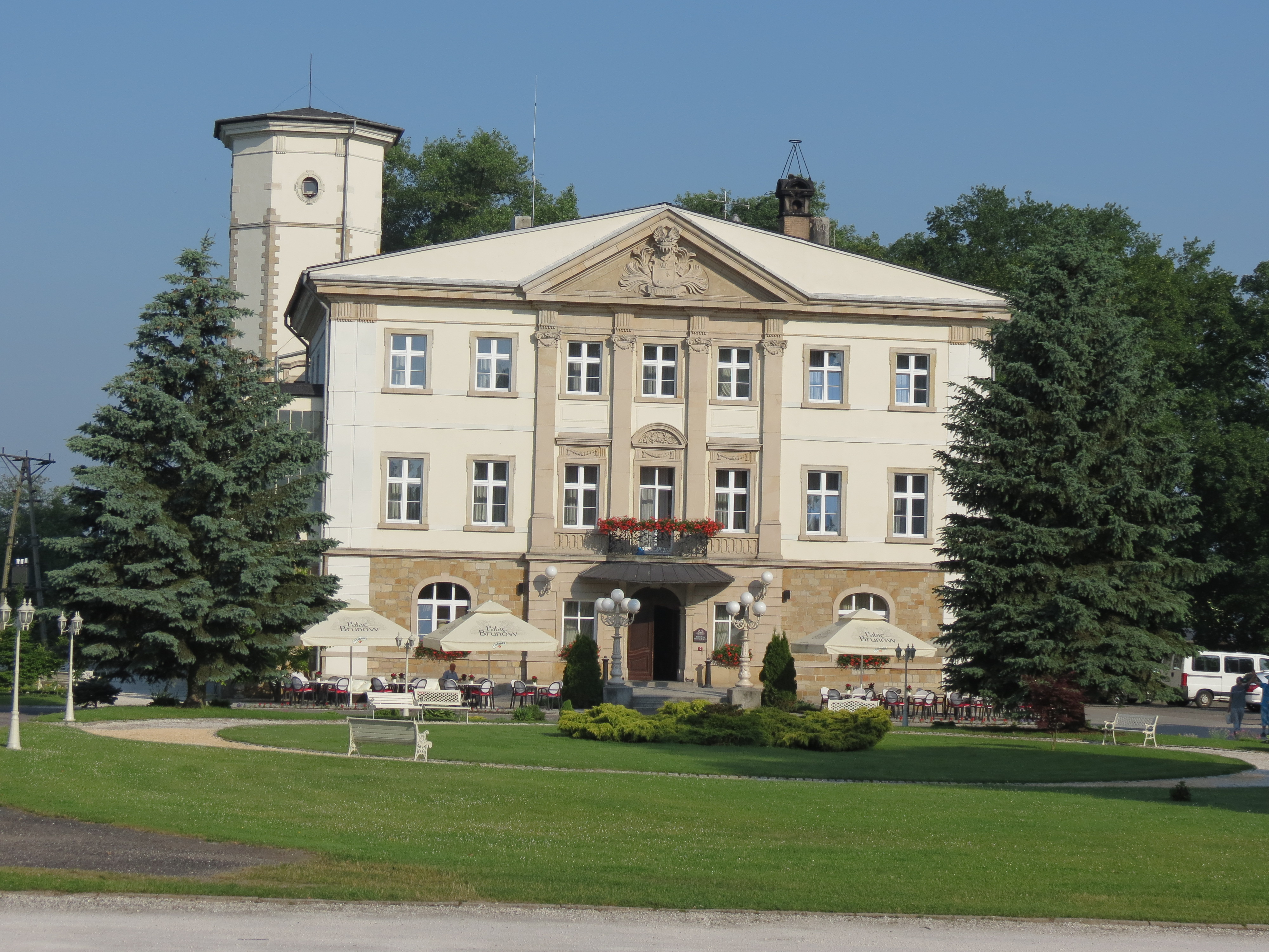 Brunów, pałac, 3 ćw. XVIII, XIX